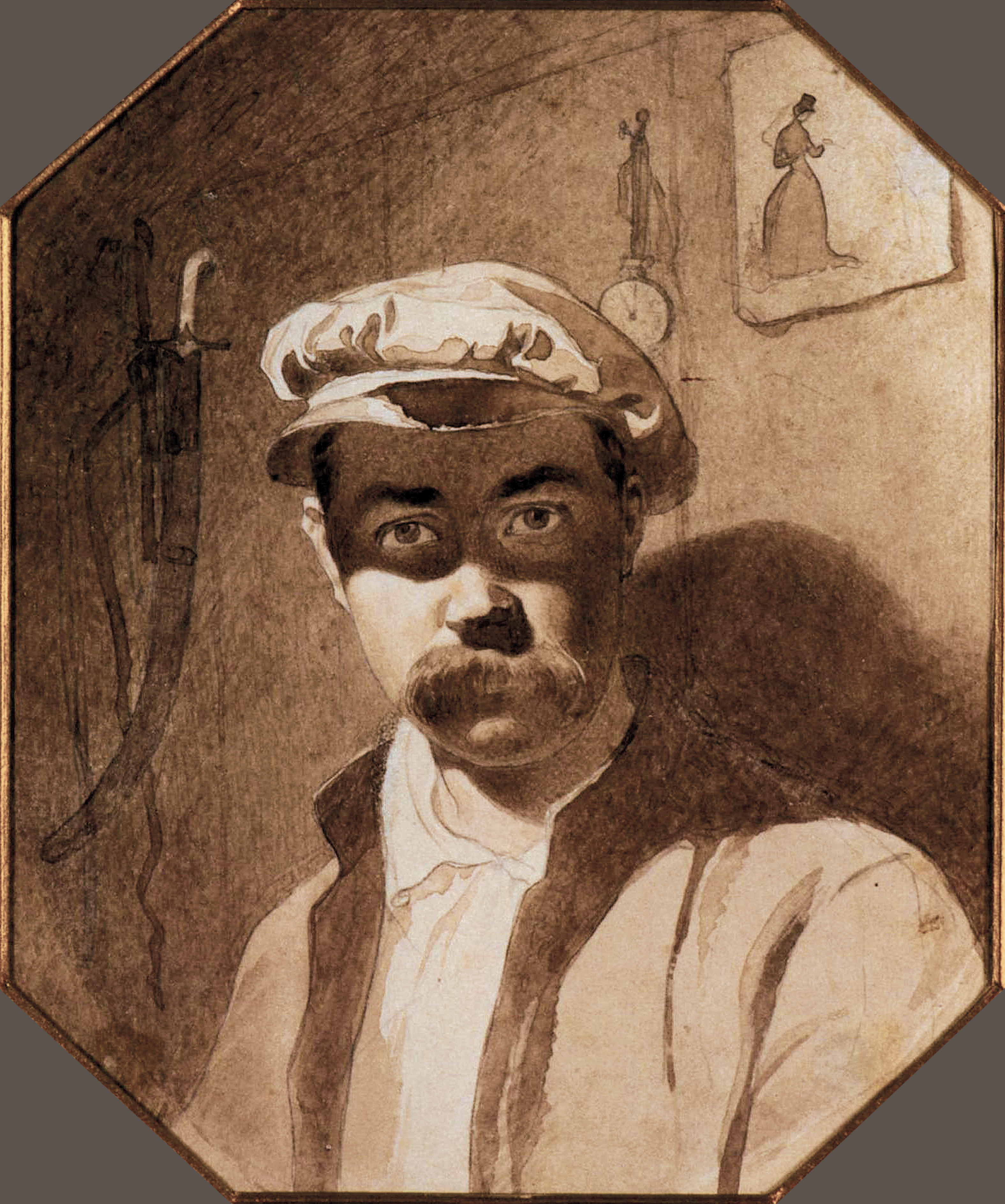 Тарас Шевченко. Автопортрет. Косарал, 1848 На звороті паспарту на паперовій наклейці напис чорнилом польською мовою: «1850 r. w Orenburgu wlasnoręczny portret Tarasa Szewczenki, ofirowany Arkadiuzowi Węgrzynowskiemu. Нижче олівцем: «Portretten Szewczenki przezniego [same]go malowany otrzymalem od mego wuya Ark[adiusza] Węgrynowskiego w Odessie w 1890 roku» **. Післянерозбірливого підпису: «N. B. Wegrzynowski byl towarzyszem wygnancia T. Szewczenki w Orenburgskich Rotach w 1850 r.» *** (*) 1850 року в Оренбурзі власноручний портрет Тараса Шевченка, подарований Аркадієві Венгжиновському (польськ.). (**) Цей портрет Шевченка, ним[самим] намальований, я отримав від мого вуя Арк[aдія] Венгжиновського в Одесі 1890 року (польськ.). (***) Н. Б. Венгжиновський був товаришем вигнанця Т. Шевченка в Оренбурзьких ротах у 1850 р. (польськ.). Сепія. 15,6 × 12,9. Місце створення: Казахстан, Кизилординська область, Аральський район, острів Косарал. Місця зберігання: з 1850 — власність А.М. Венгржиновського; з 1890 — у племінника Венгржиновського; з 1925 — у Музеї Наукового товариства імені Шевченка у Львові; з 1935 — у Національному музеї у Львові ім. А. Шептицького.